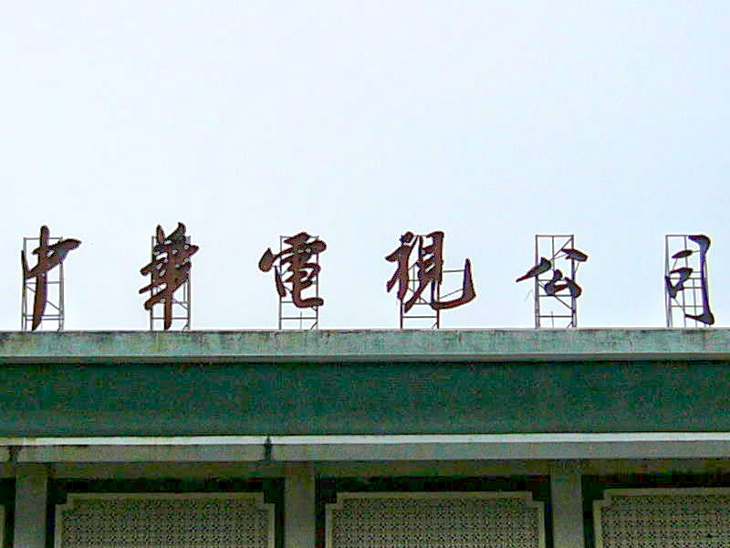 中華電視公司「攝影大樓」正面上方的蔣中正楷書體「中華電視公司」六字。